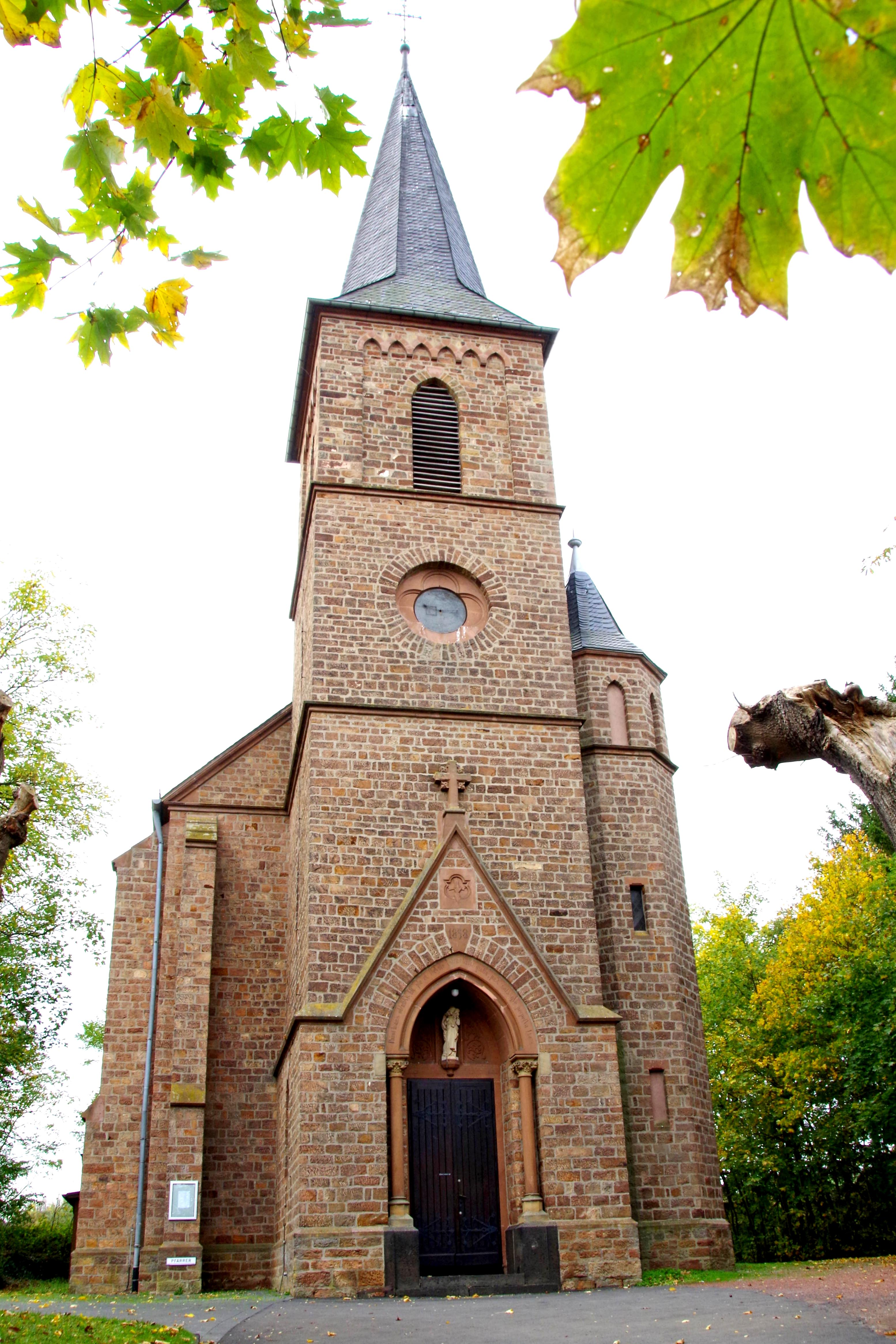 St. Goar (Harzheim)